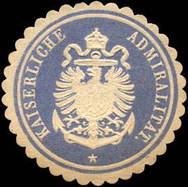 Sealing stamp Title: Kaiserliche Admiralität Description: hellblau, weiß, geprägt, Marine Place: size: 4 cm